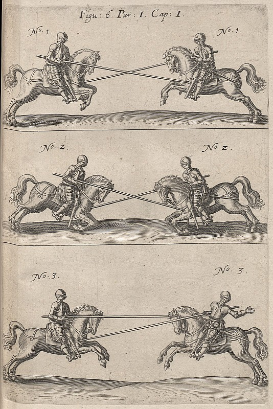 Original image description from the Deutsche Fotothek Kriegskunst & Pferd & Lanzierer & Lanze